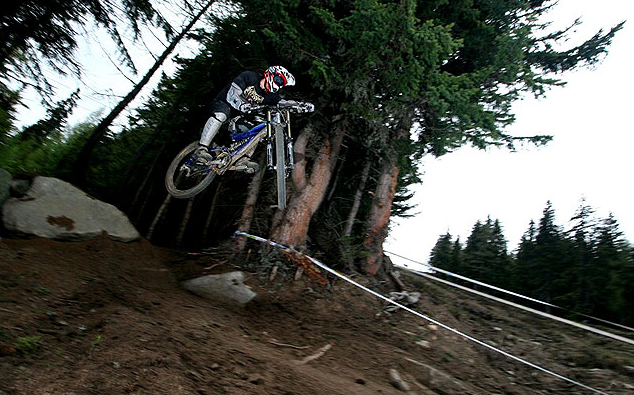 Schneller, weiter Sprung. Fahrer: HEIDY